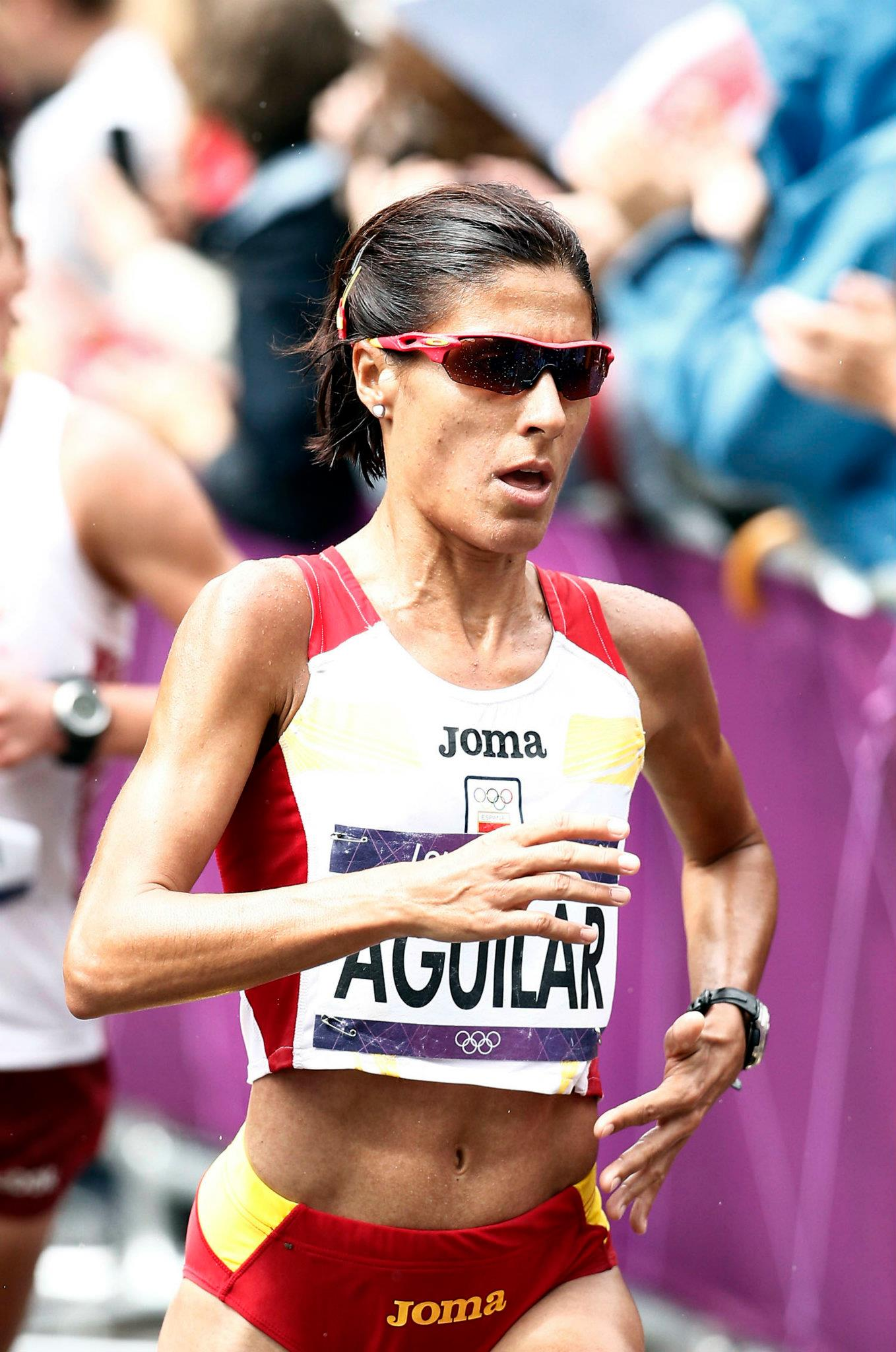 JJ.OO Londres 2012